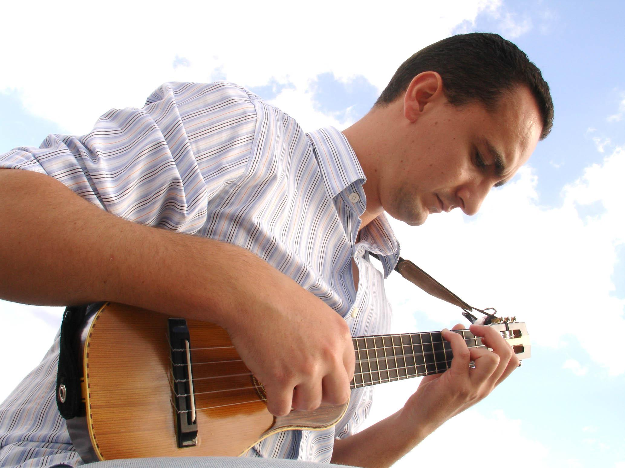 Foto del Timplista Pedro Izquierdo